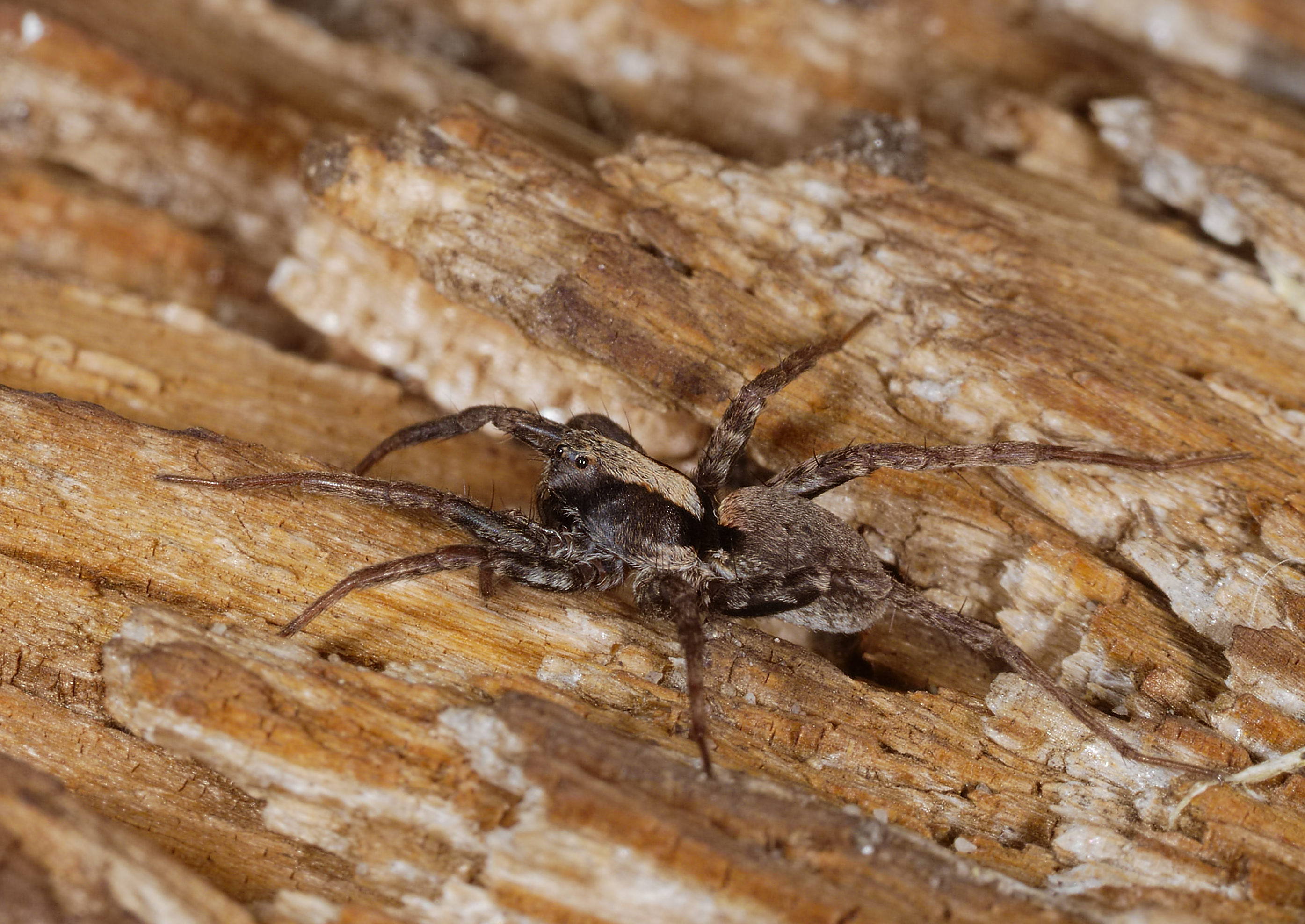 Wolfspinne - Xerolycosa nemoralis, Weibchen. Aufgenommen in Mannheim im Käfertaler Wald, Baden-Württemberg, Deutschland.